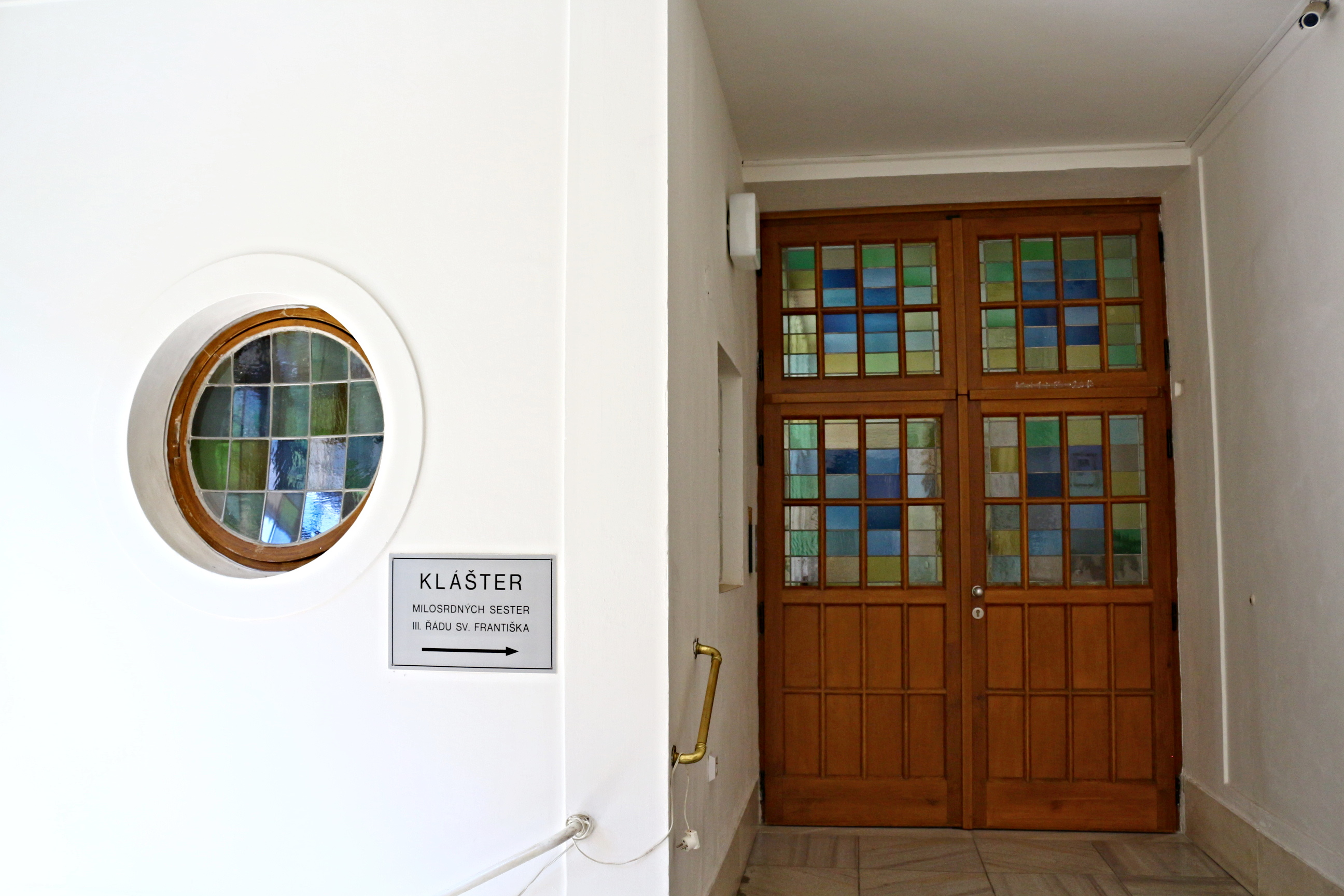 Brno Klášter milosrdných sester a kostel svaté Rodiny